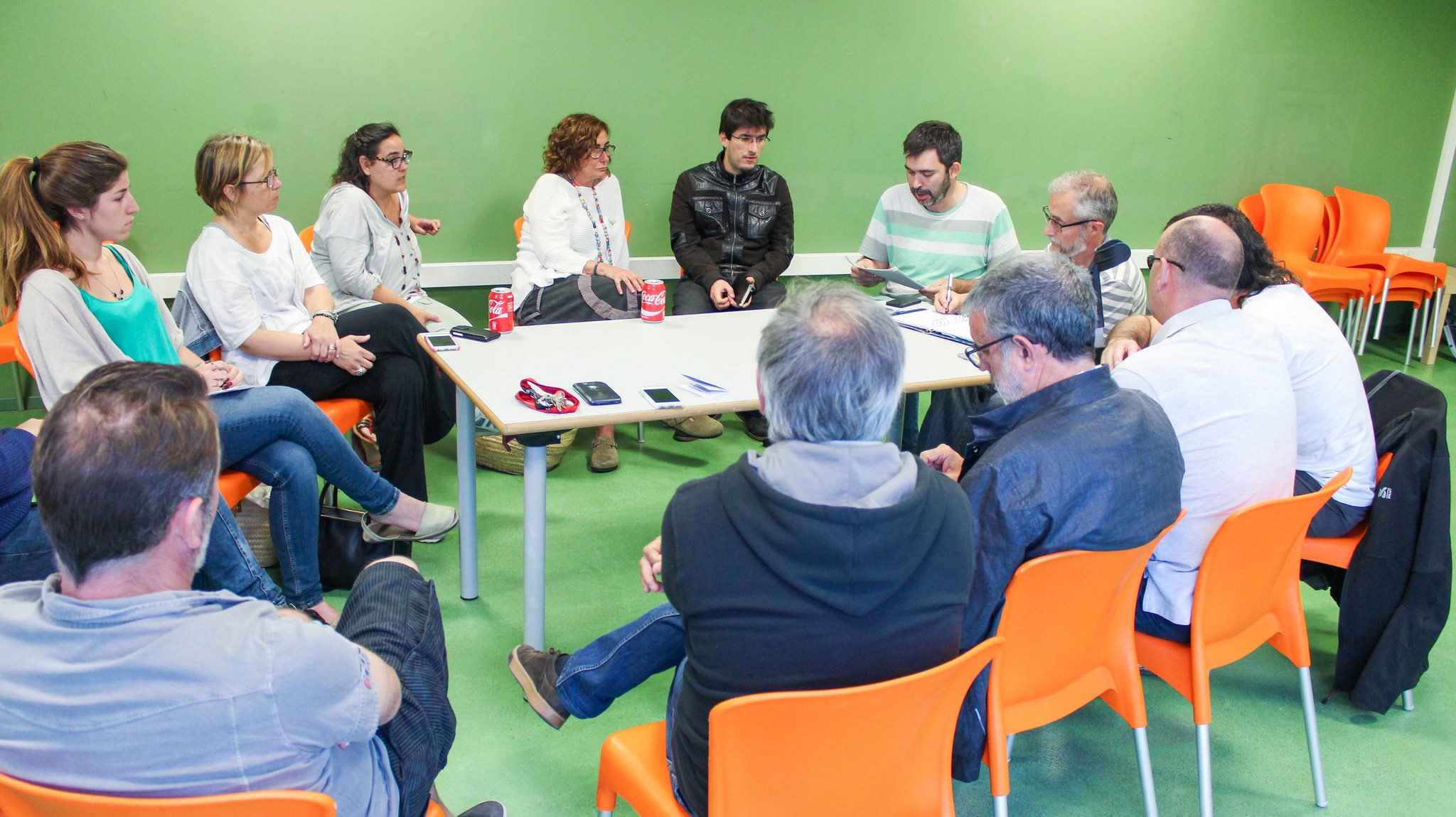 Assemblea de Junts per Tiana al centre cívic l'Escorxador de Tiana.